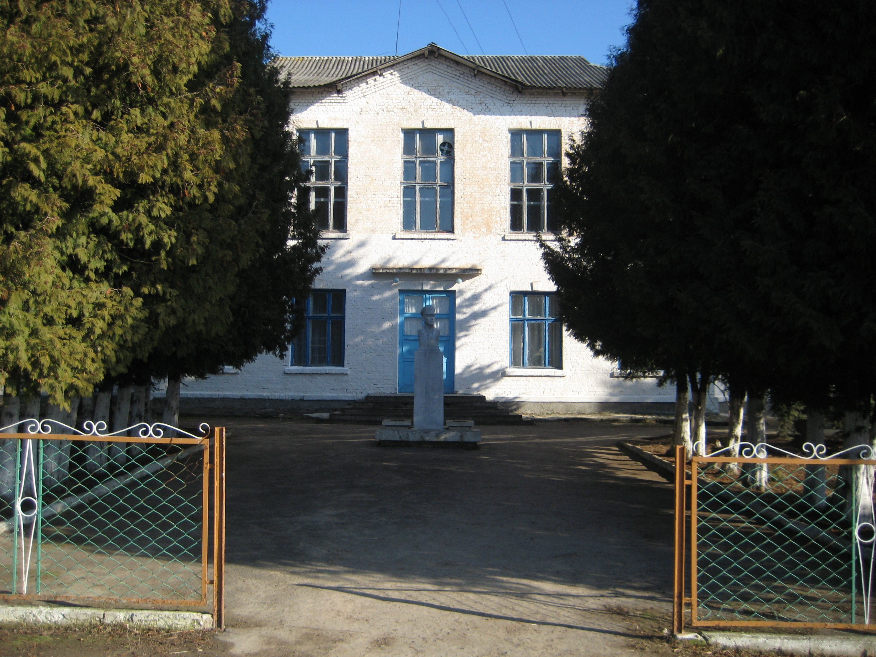 Вовковиївська загальноосвітня школа І-ІІІ ступенів Рівненська область Демидівський район